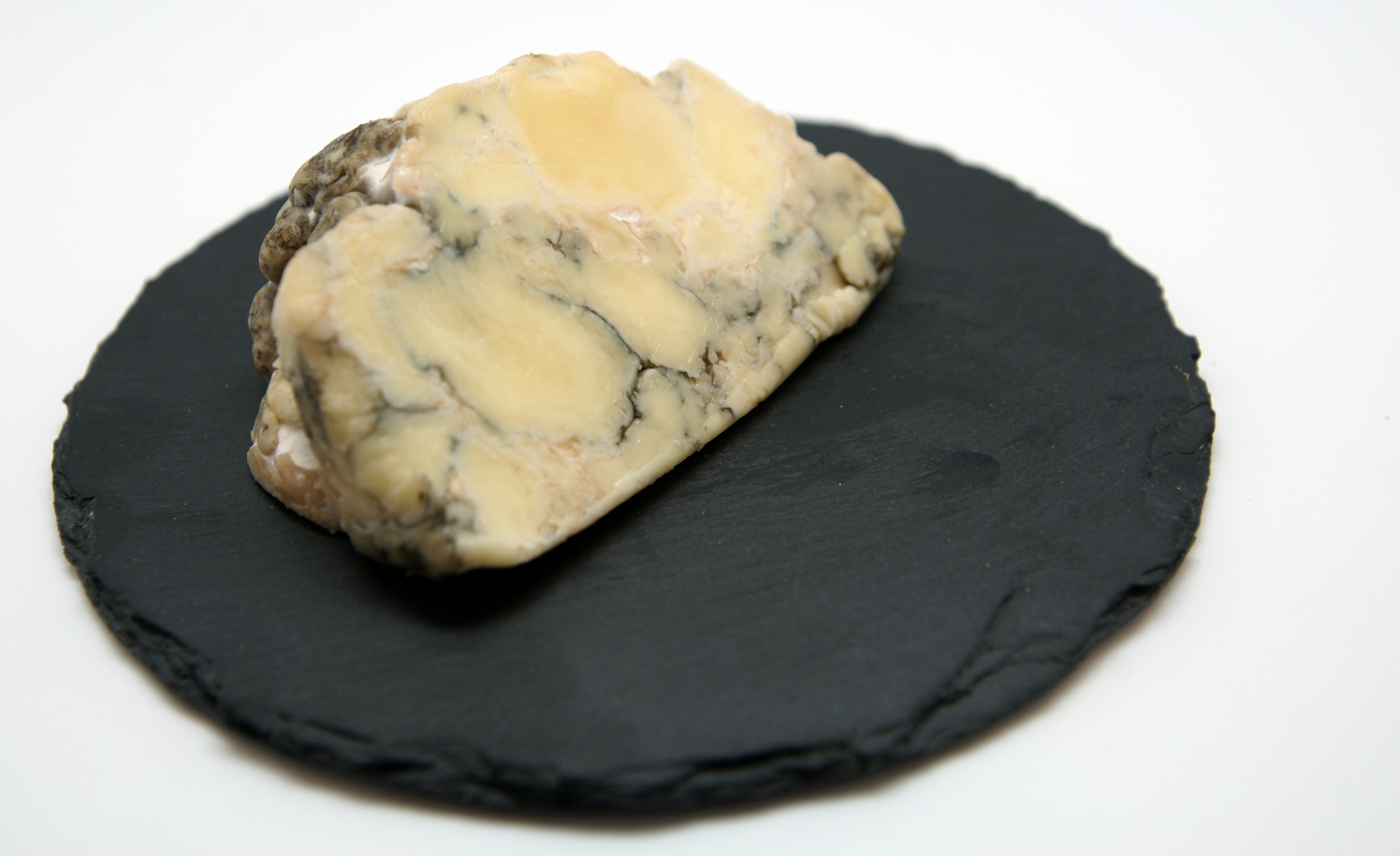 Belper Mürggel jeune, a Swiss cheese